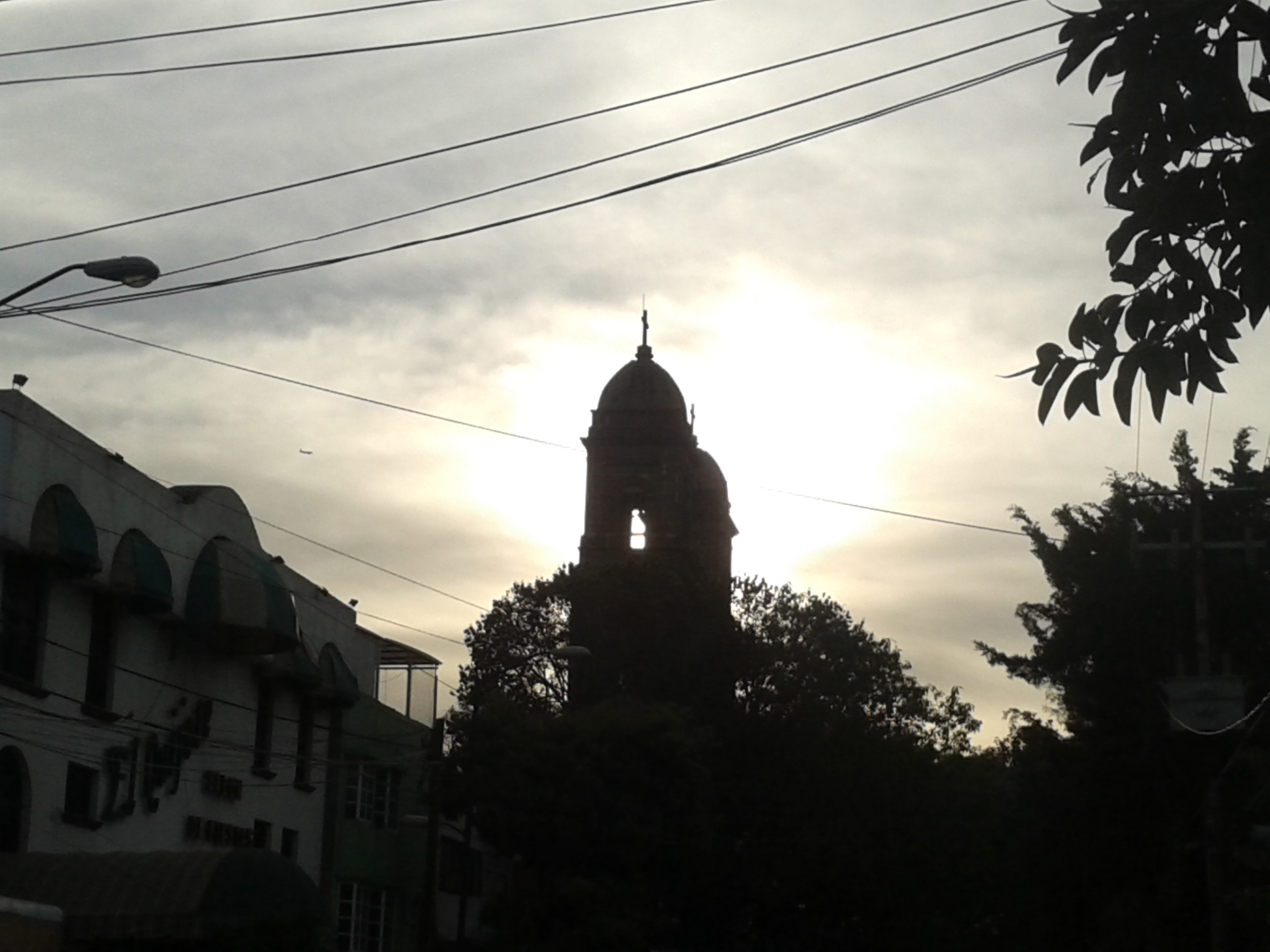 Fotografía a contraluz de la iglesia de San José de los Obreros, en la colonia Obrera, delegación Cuauhtémoc, Ciudad de México, D.F.